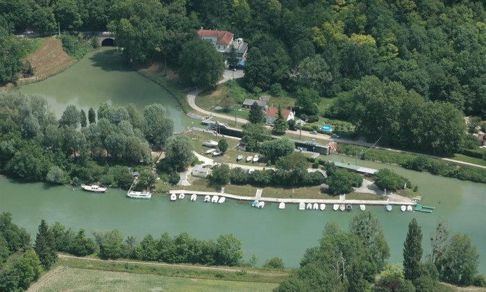 Chalifert : le port sur la Marne, l'écluse, l'entrée du canal tunnel, la guinguette.